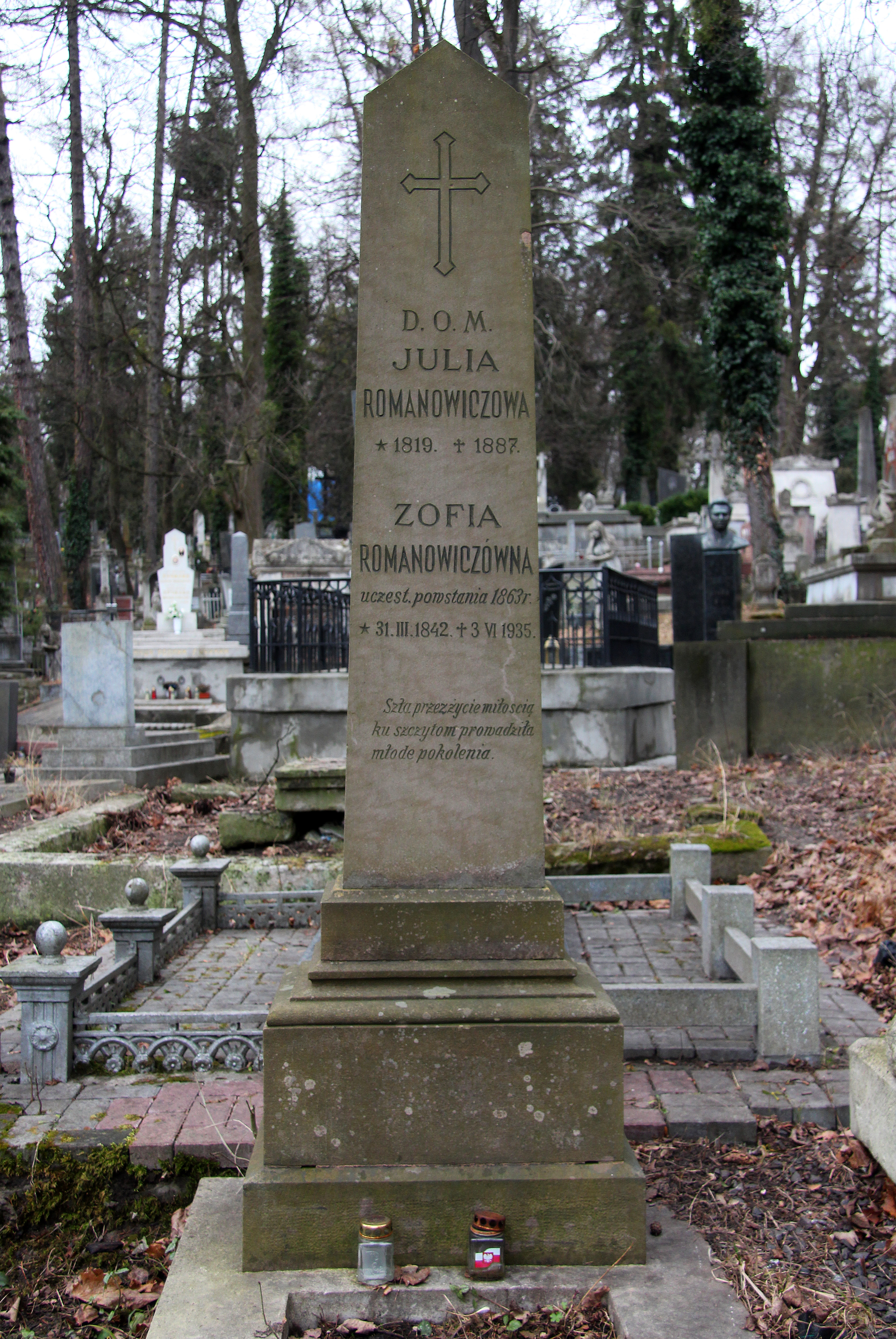 Пам'ятник на могилі С. Романовічувни.Личаківський цвинтар , поле № 2.